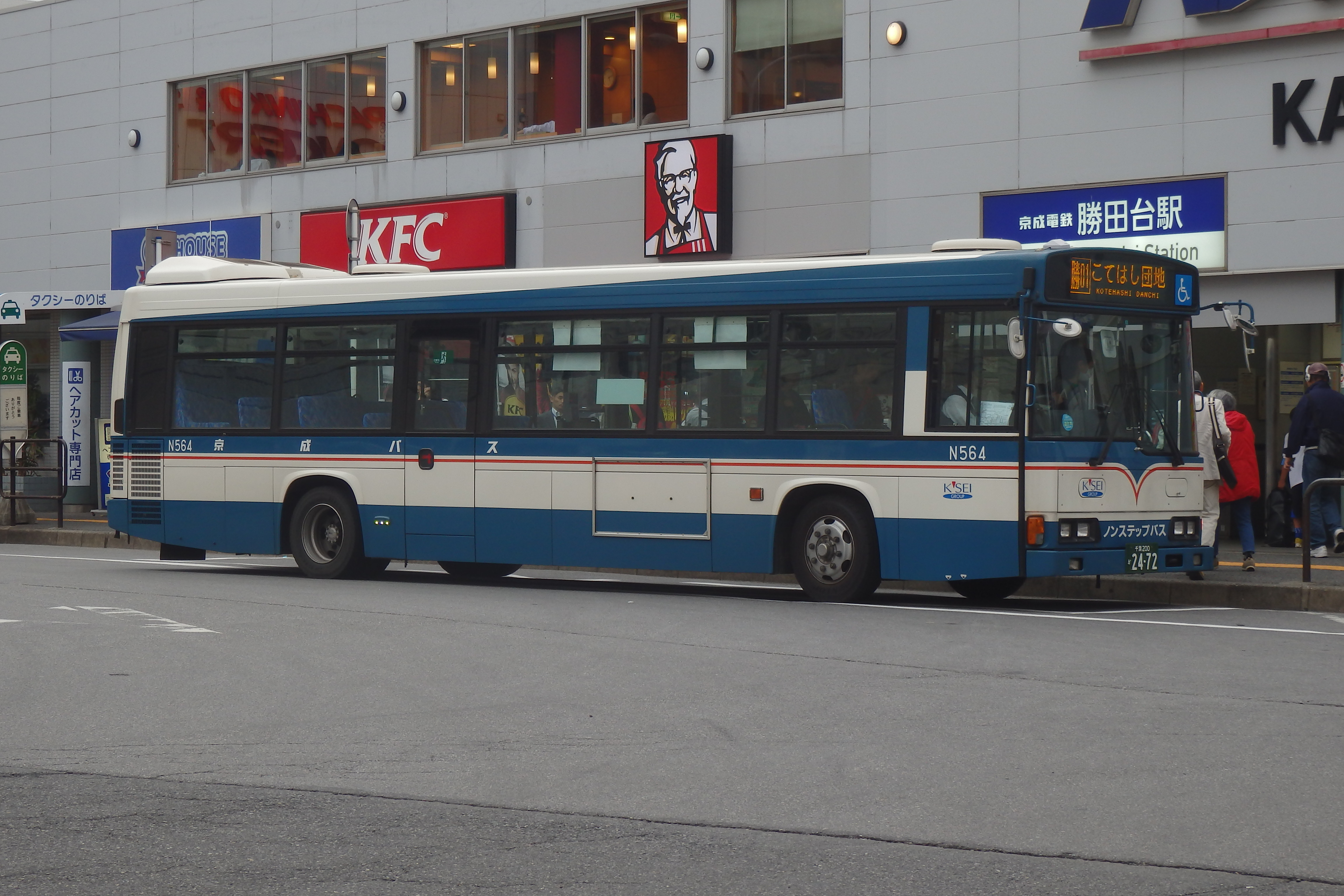 N564 こてはし団地線運用時